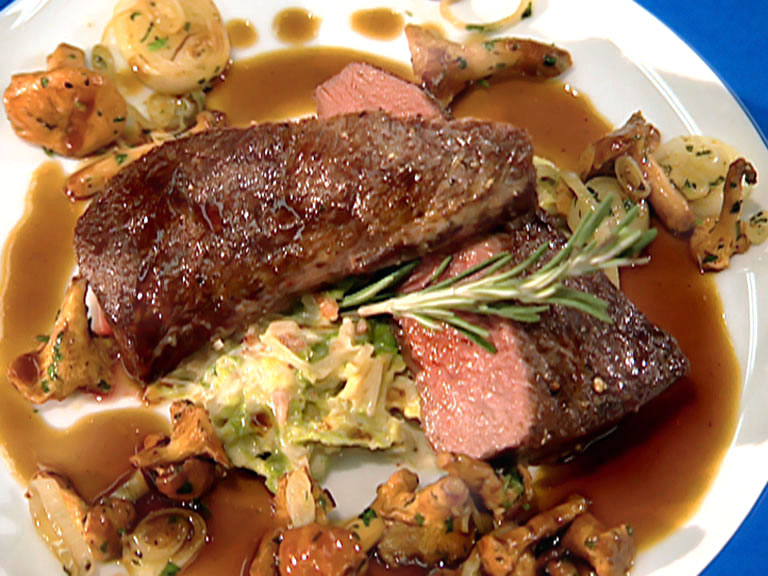 Rezept, vorbereitet und gedreht für die Gartensendung Querbeet